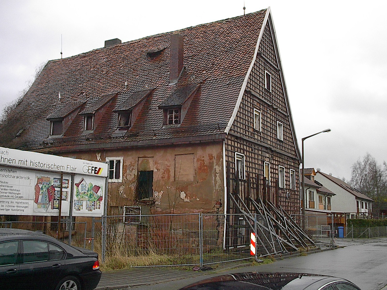 "Vorderes Schloss" / "Voitenhaus" in Nürnberg Maiach, bis 1834 im Besitz der Tucher von Simmelsdorf, Innstraße 43-47